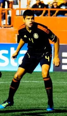 Mexico vs independiente de Medellin, partido de la seleccion mexicana jugado en el estadio Caliente de Tijuana, mas info videos y fotos en en: Néstor Araujo Mexican footballer who plays as a defender. es: Néstor Araujo futbolista mexicano que juega como defensor.